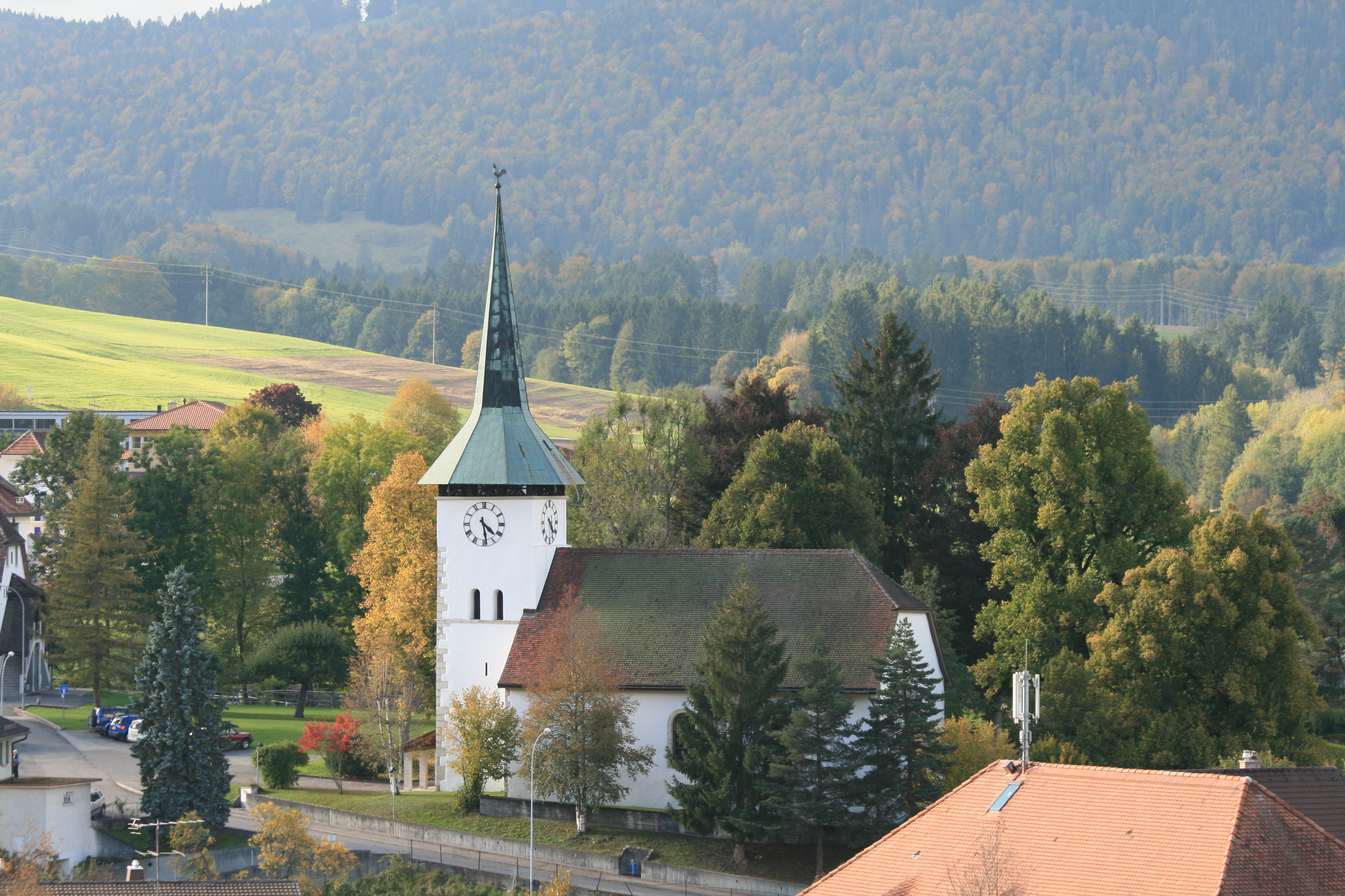 Tavannes